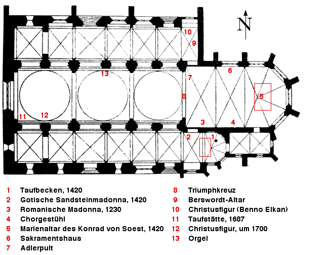 Lageplan der Ausstattung in der Marienkirche, Dortmund